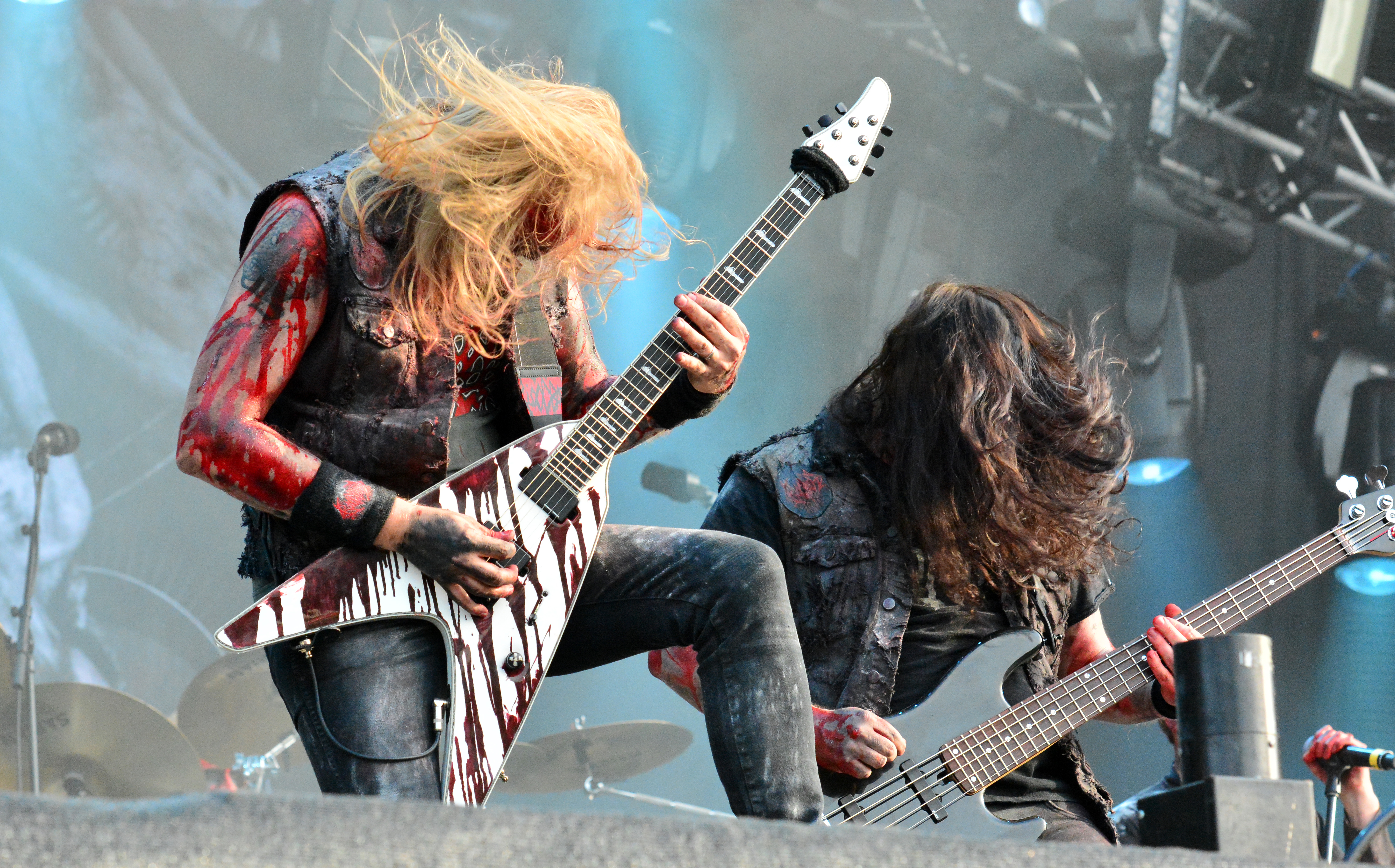 Bloodbath beim Wacken Open Air 2015